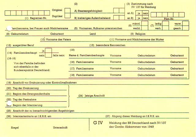 Zivilinterniertenmeldekarte